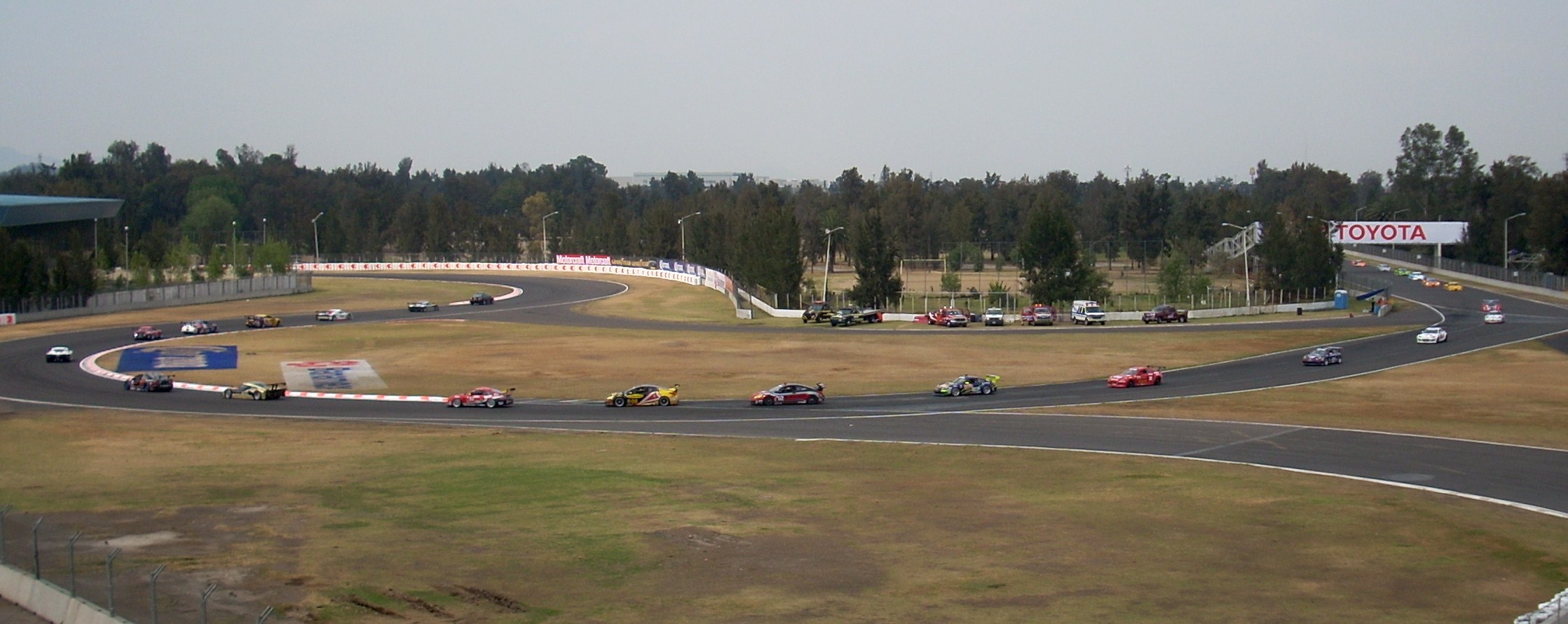 Grand-Am Rolex Sports Car Series at Autódromo Hermanos Rodríguez 2008